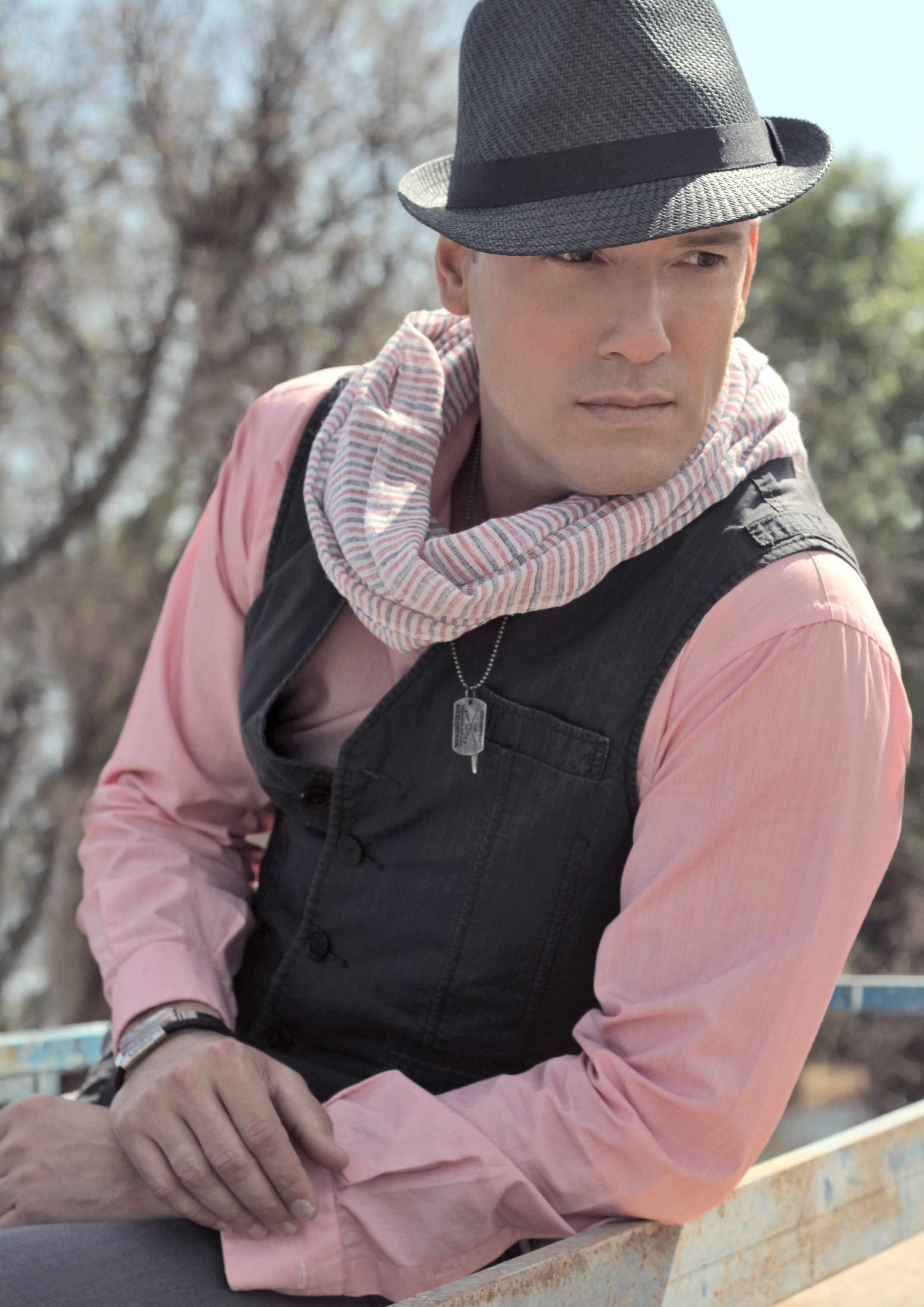 Foto del artista en el Cortijo Doña María